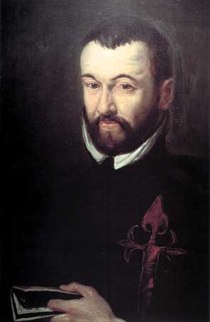 Retrato del humanista, hebraísta, biólogo y escritor políglota español Benito Arias Montano (1527-1598), Museo Plantin-Moretus.